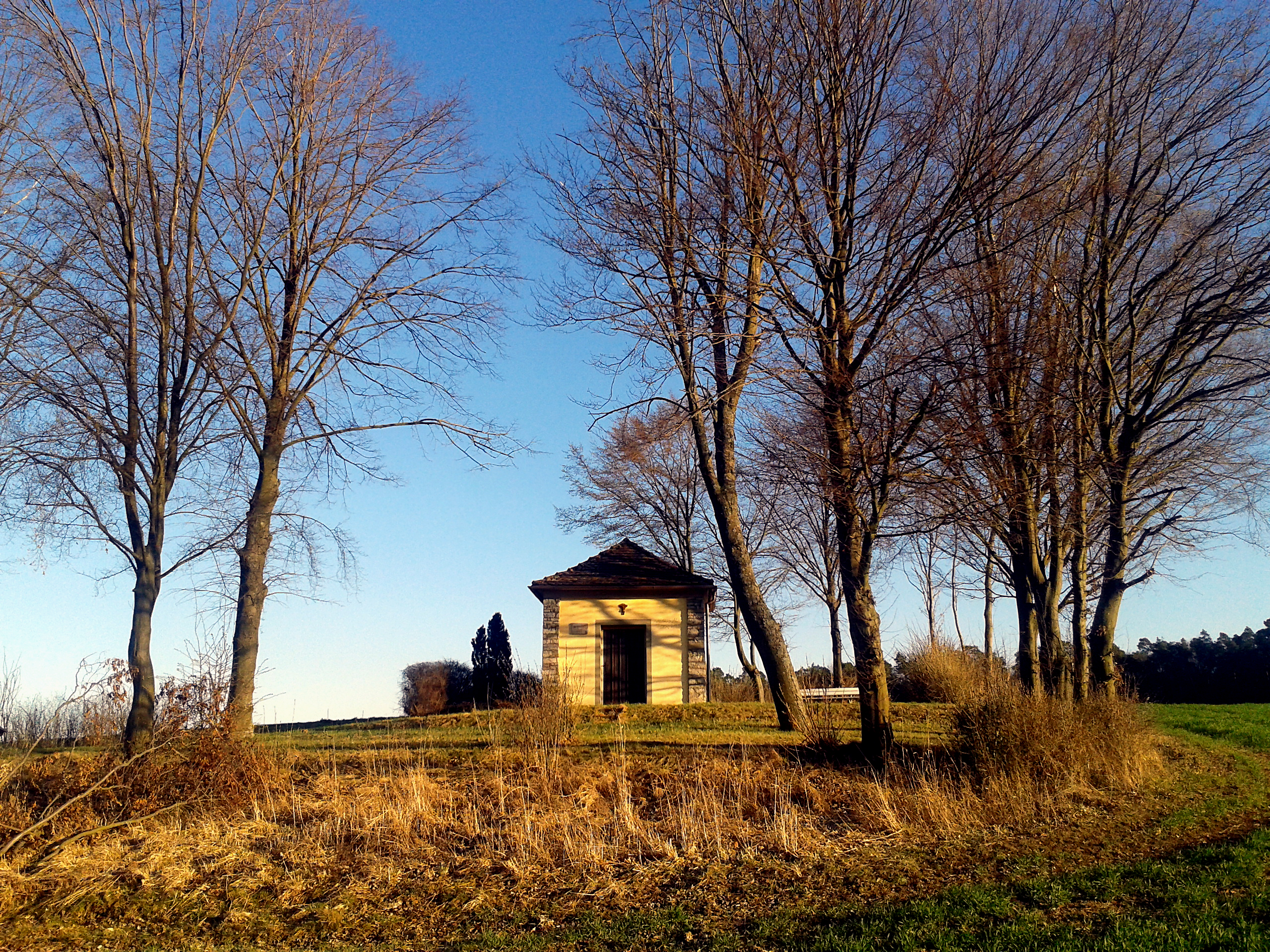 Feldkapelle bei Rimbach/Unterfranken